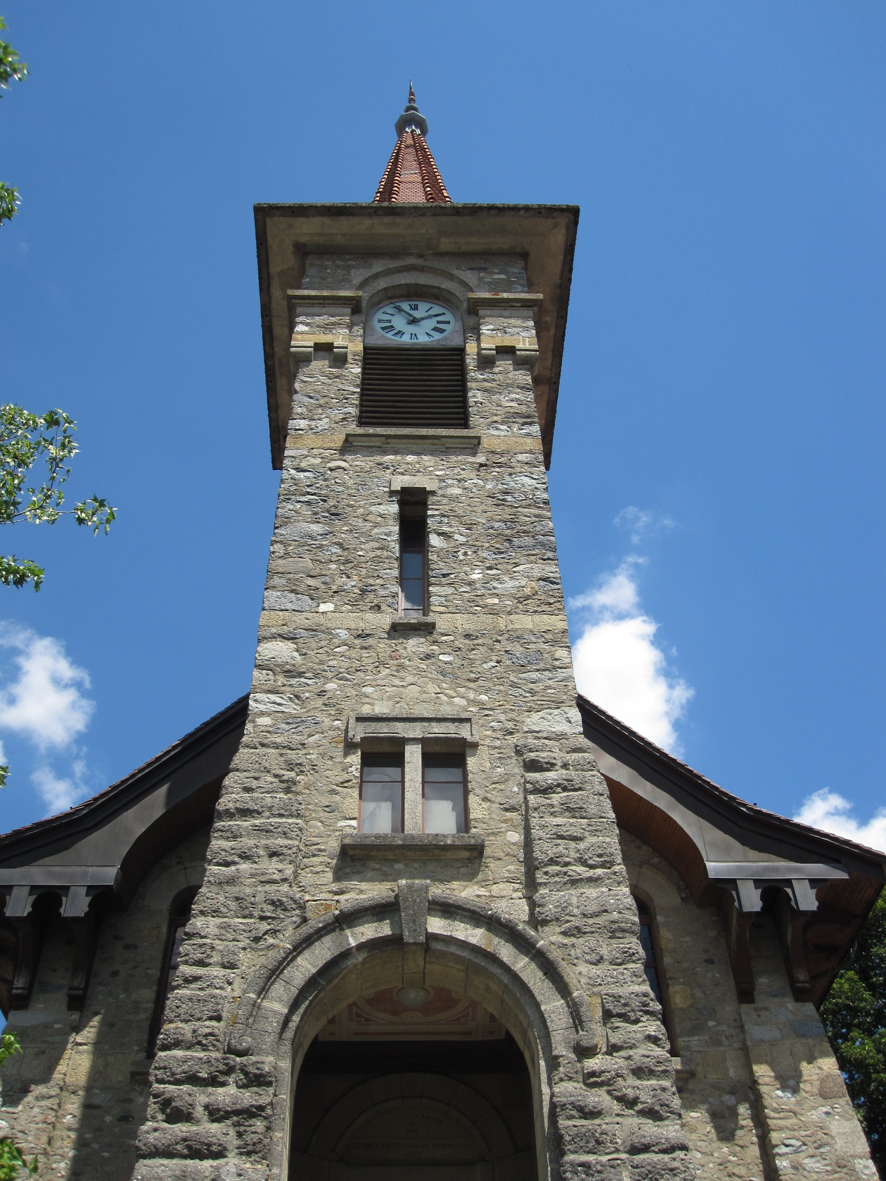 L'église